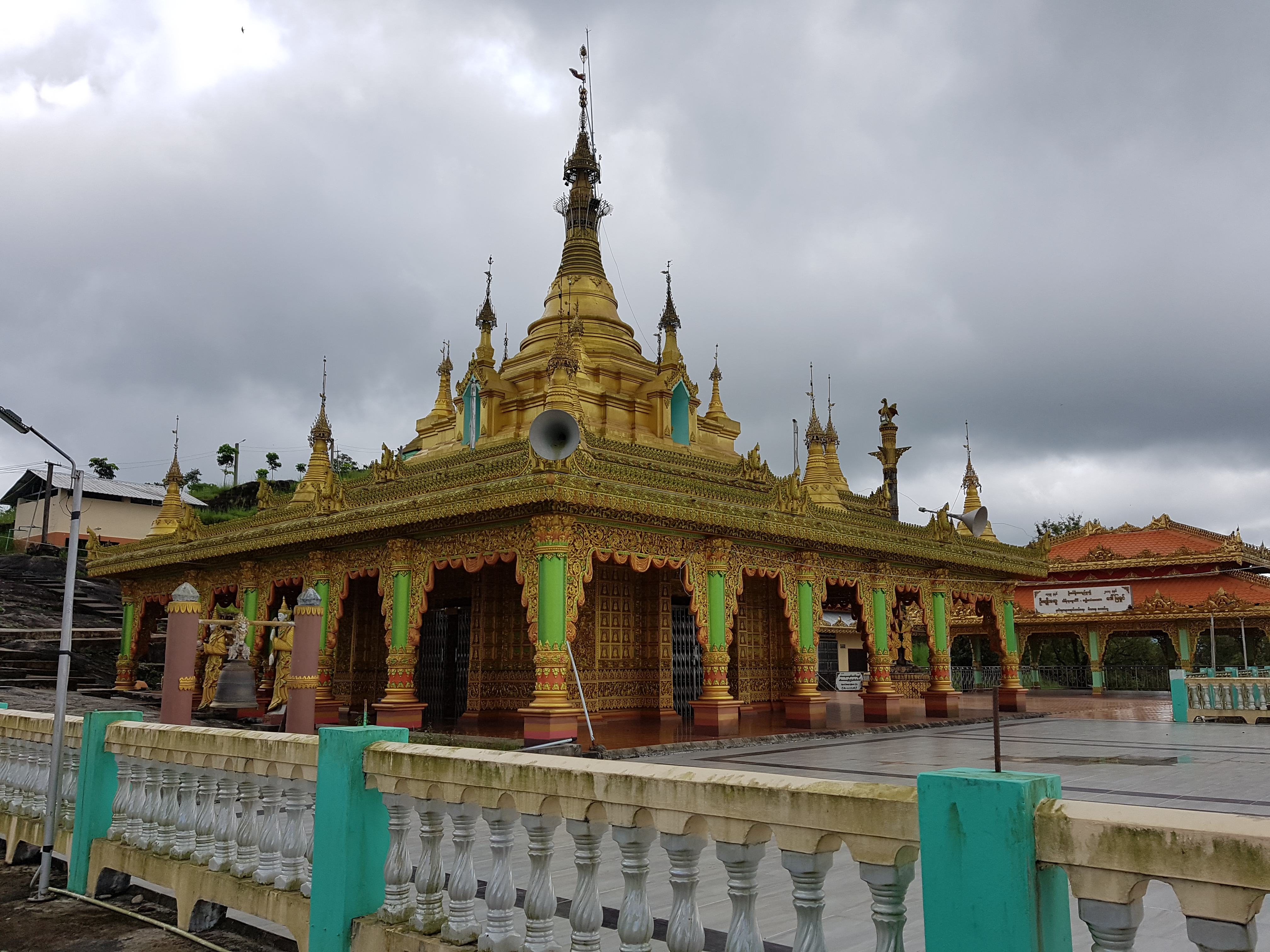 ကမ္ဘာလှစက်​တော်ရာ​စေတီ